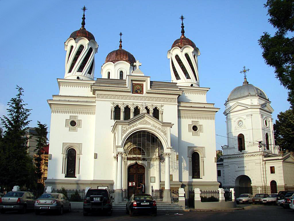 St.Silvester church - Bucharest